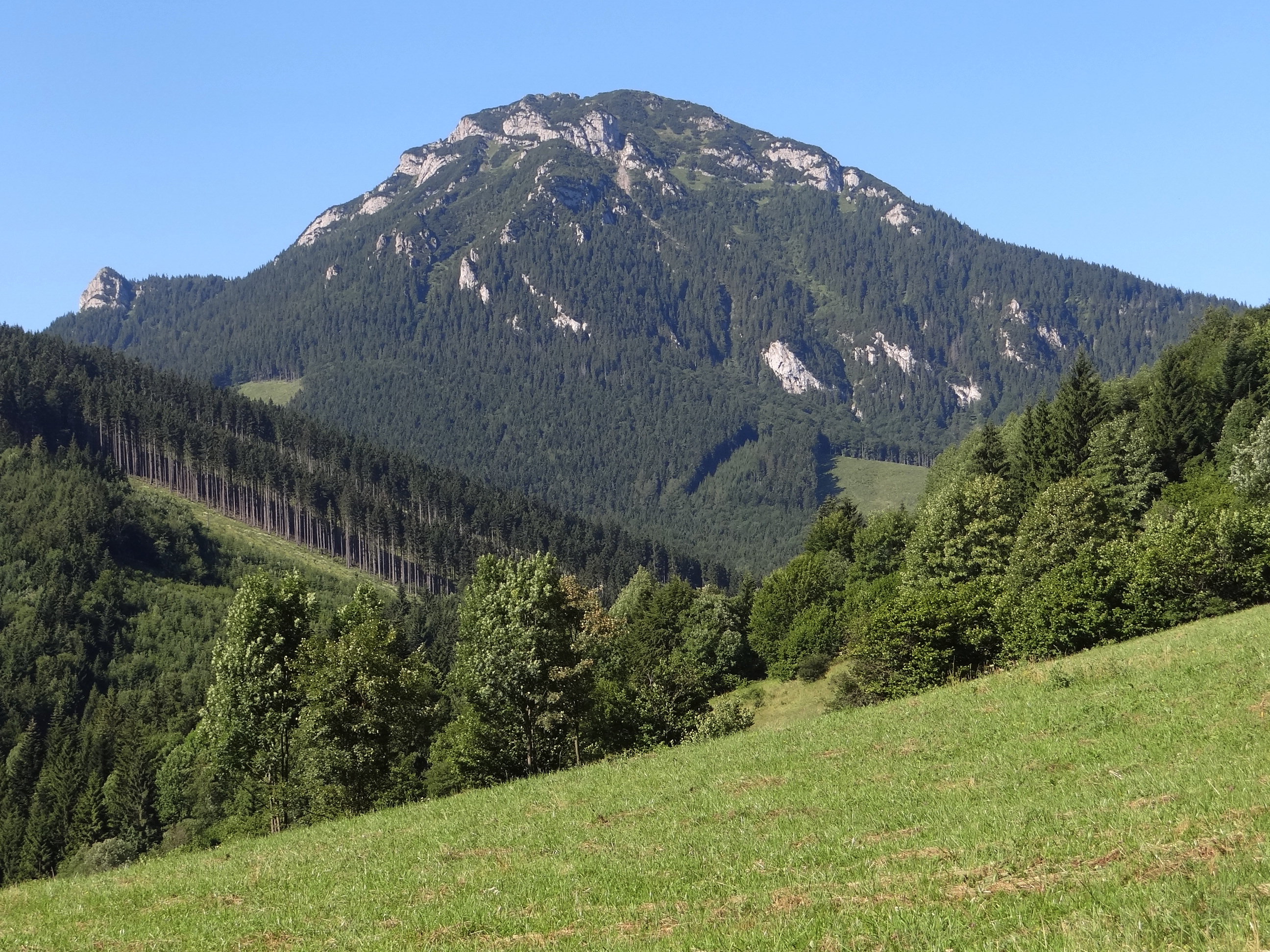 Wielki Chocz, widok od północnego wschodu